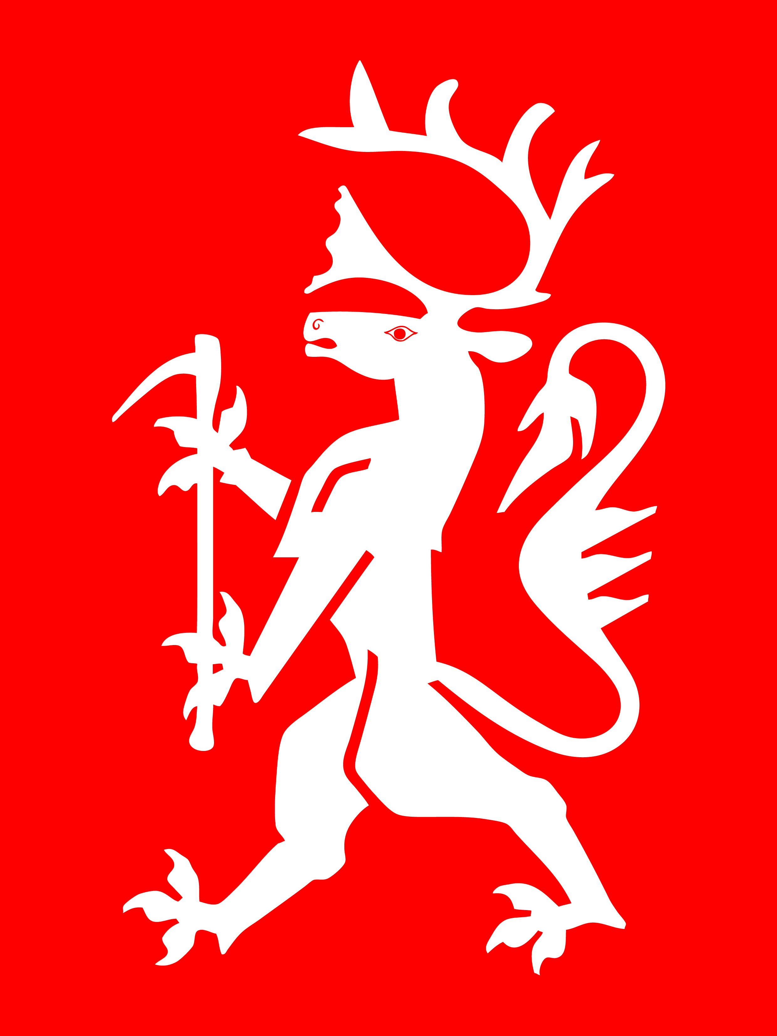 Nordting logo